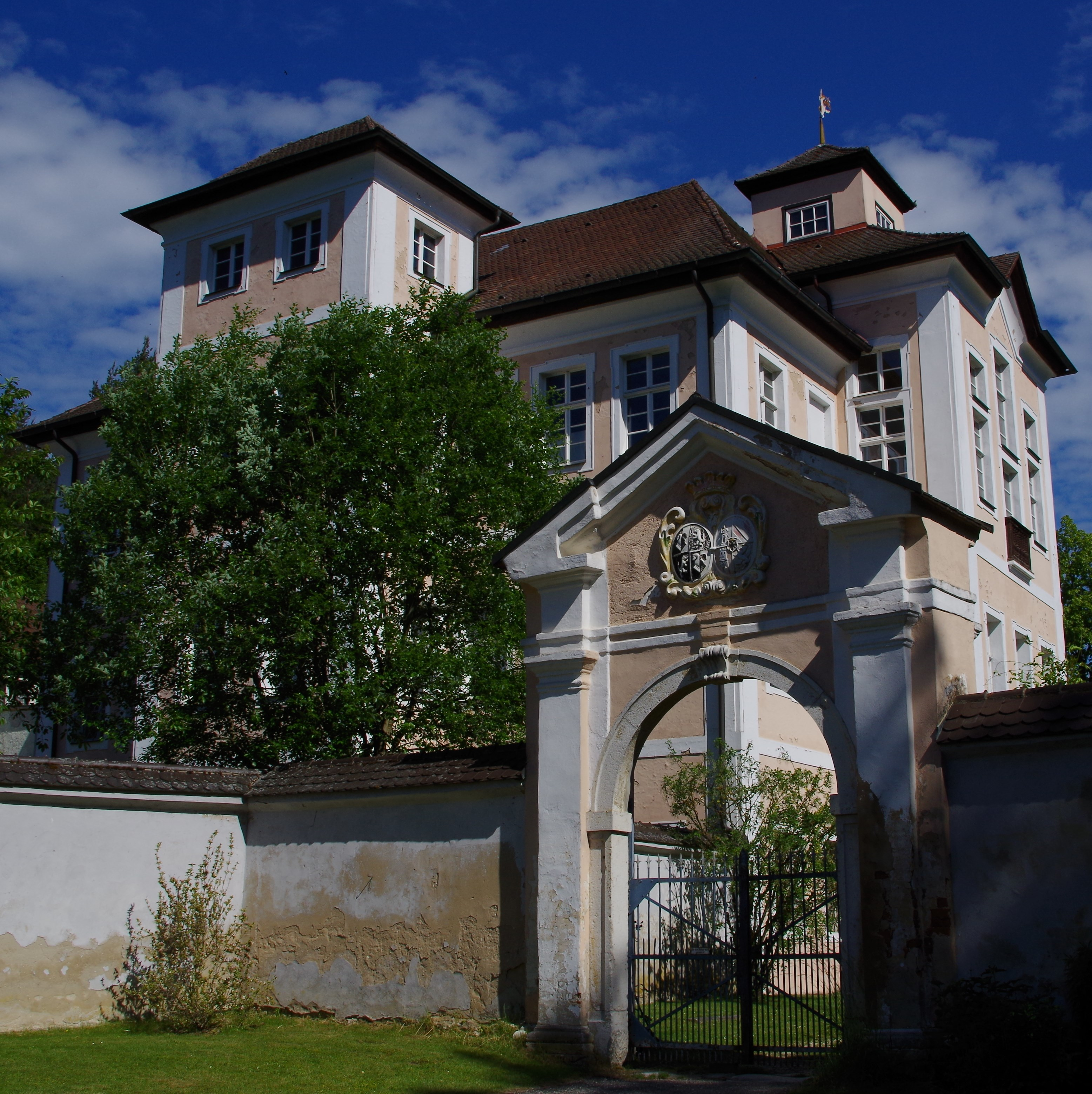 Hofmarkschloss - Dietldorf